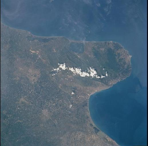 Parte del Tavoliere vista dal satellite - ITALY UNFOCUSED EARTHOBS STS100-708-38